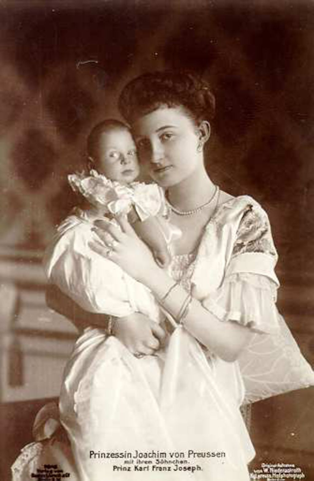 Ansichtskarte von Marie Auguste von Anhalt (Gemahlin von Joachim von Preußen) mit Sohn Karl Franz Joseph von Preußen.